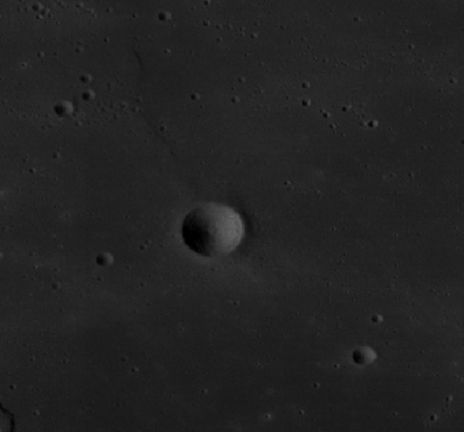 Cráter lunar Humason. (Imagen LRO)